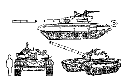 T-72 MBT